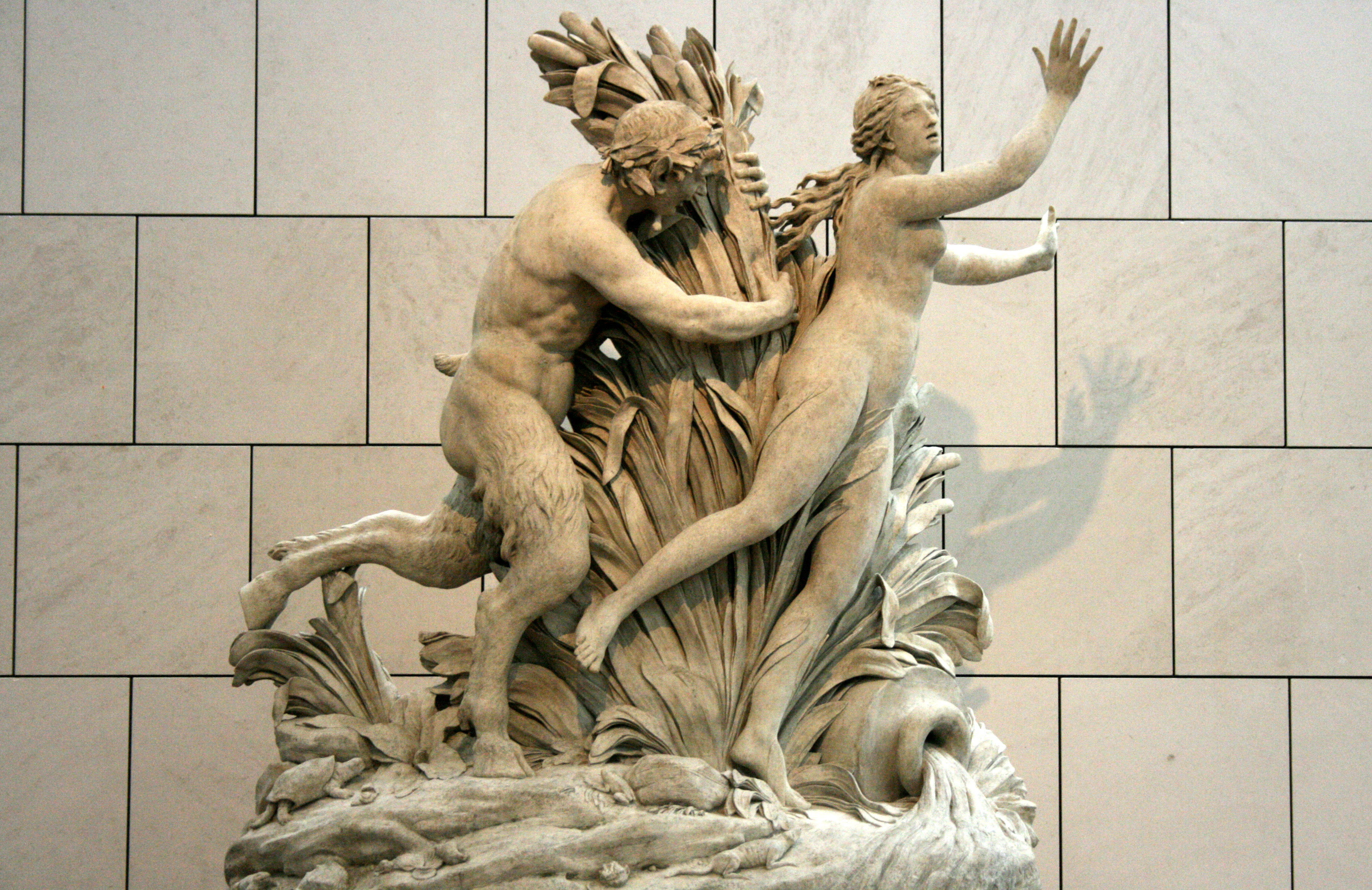 Pan poursuivant Syrinx (1804) de Gilles-Lambert Godecharle (1750-1835). Musées royaux des beaux-Arts de Belgique, Bruxelles (Belgique)